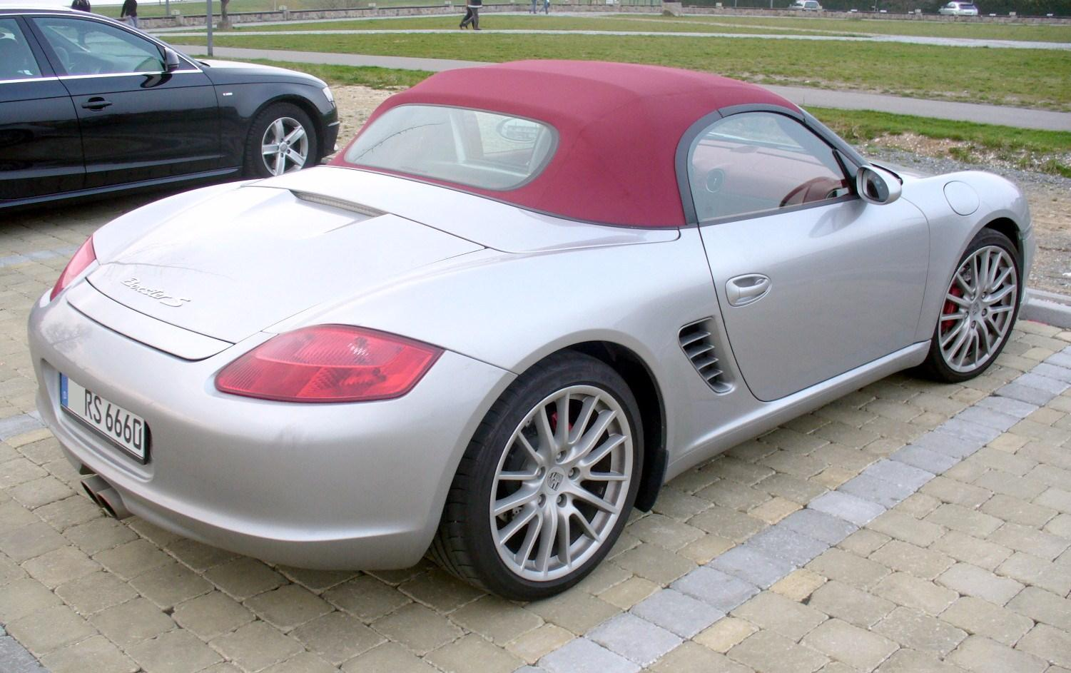 Porsche Boxster 987 RS 60 Spyder